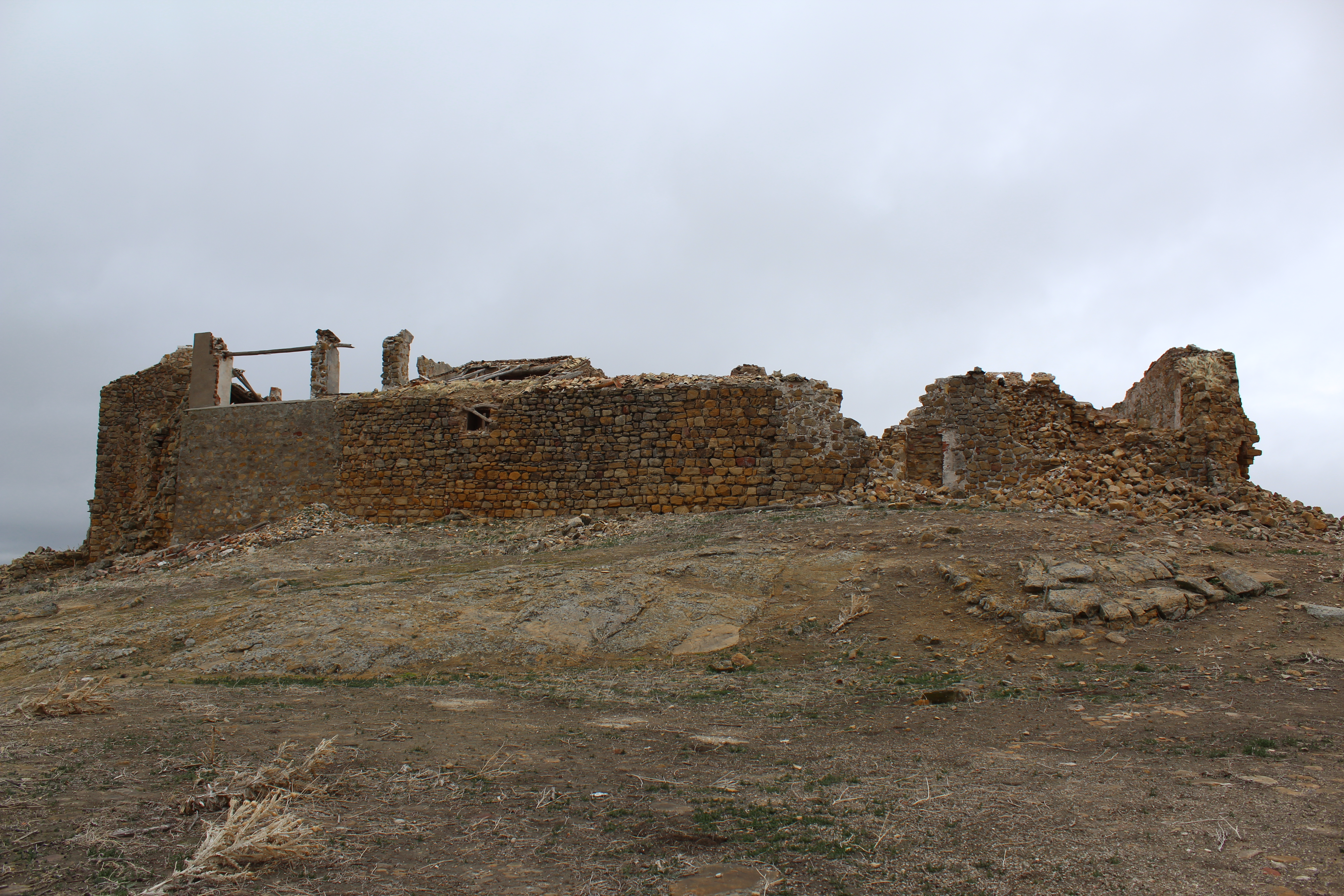 Vista general del castillo de Fuentetétar desde el lado Suroeste.